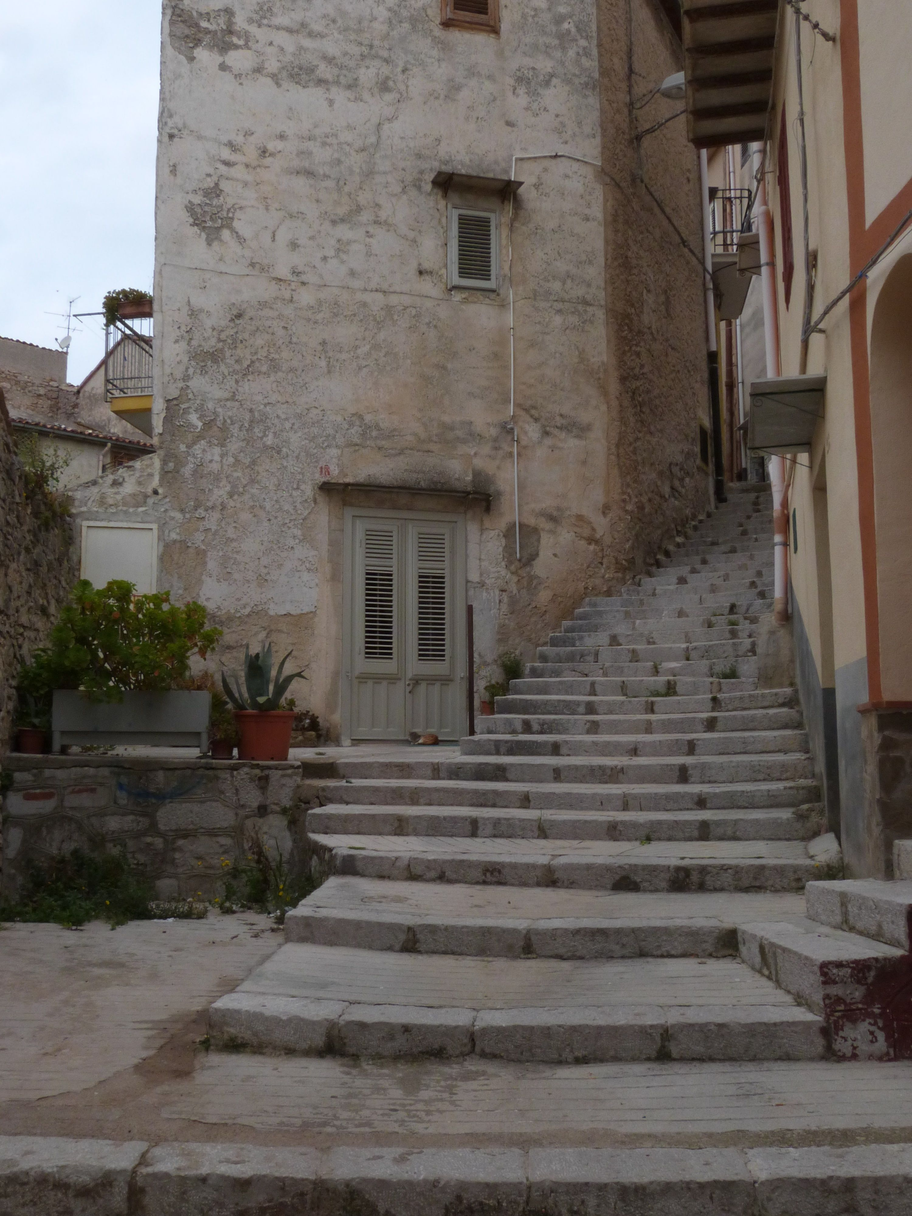 Treppe in Piana degli Albanesi, Ponte Marcello.